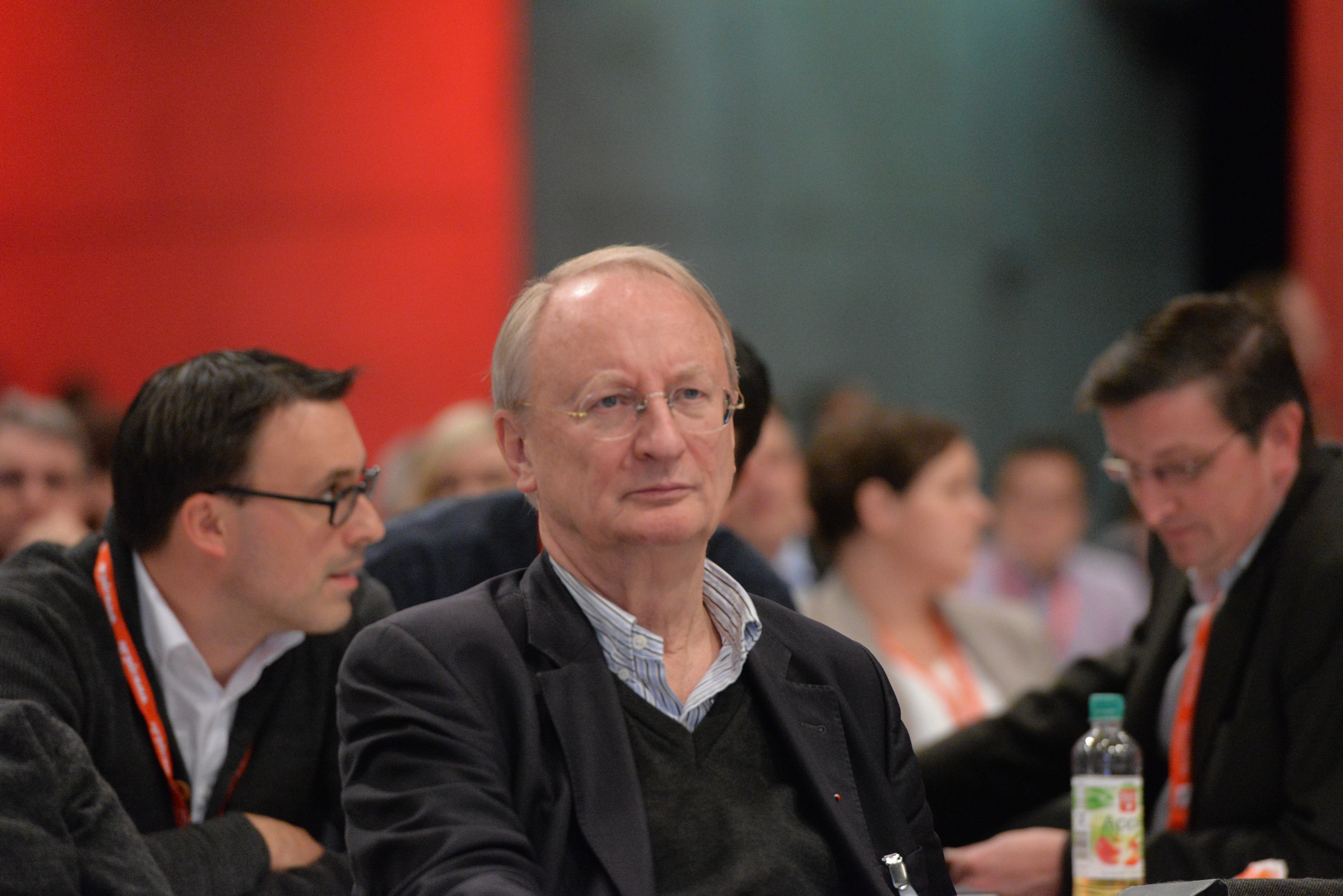 SPD Bundesparteitag Berlin, 10.-12. Dezember 2015, CityCube, Messe Berlin